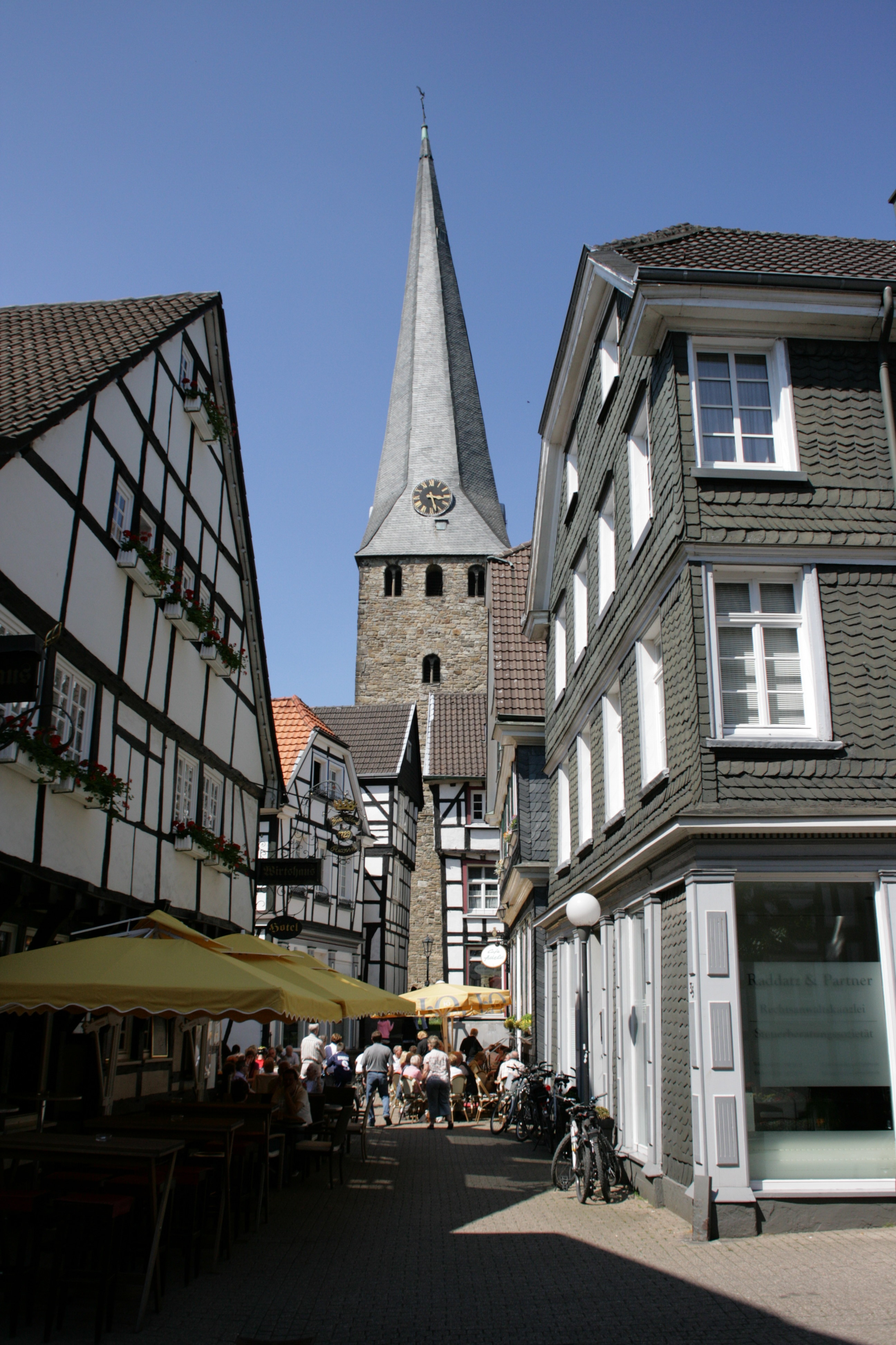 Steinhagen in Hattingen